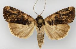 Bryolymnia mixta male